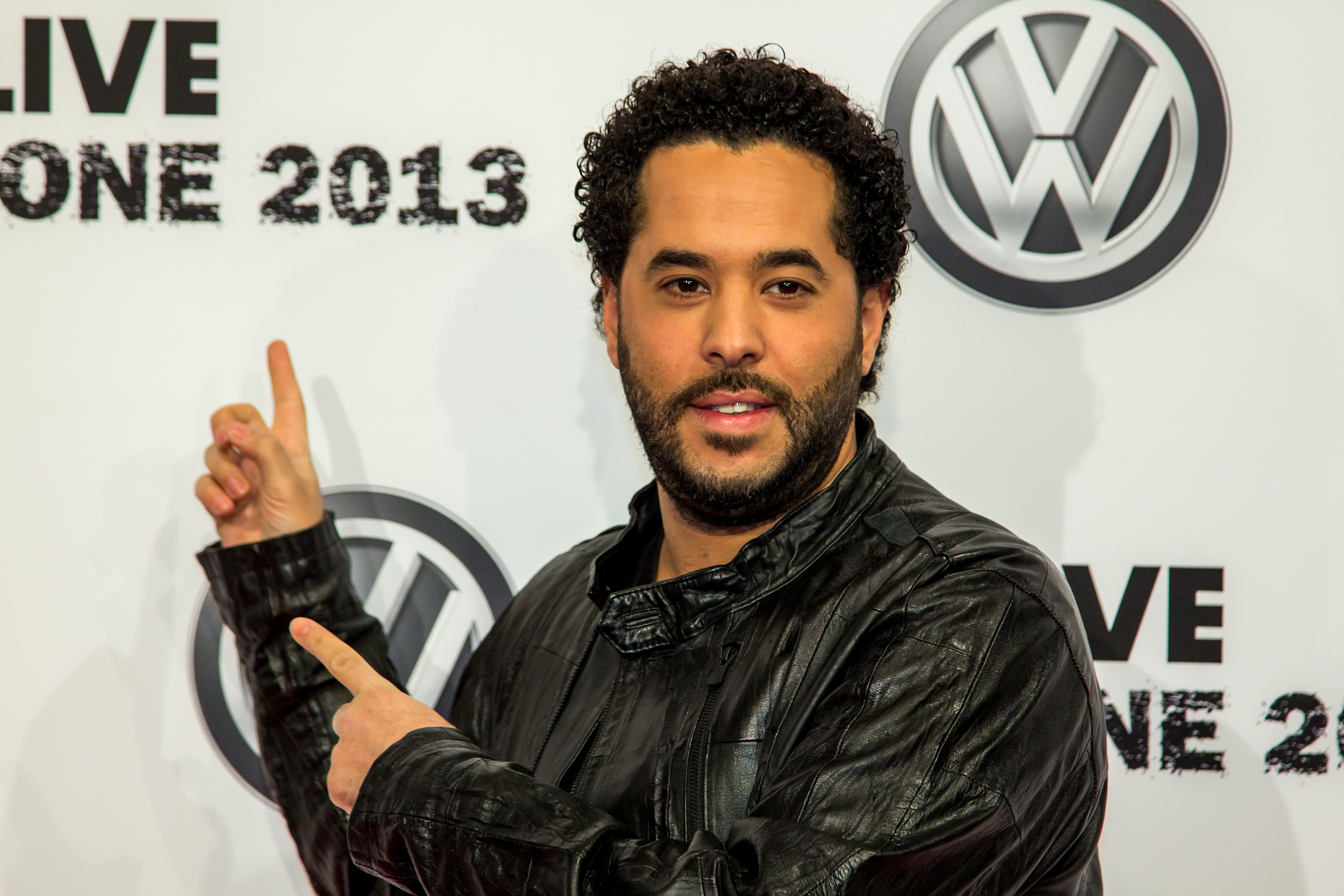 1 LIVE Krone 2013 Adel Tawil